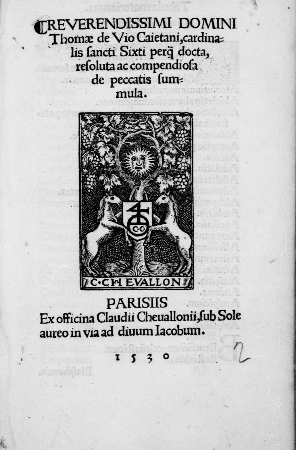 Frontespizio